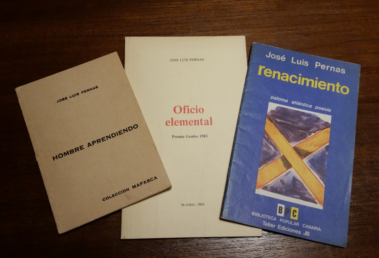 Cubiertas de algunas primeras ediciones del poeta español José Luis Pernas.